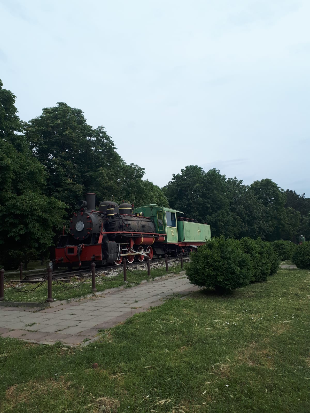 Фотографија воза, познатијег као "ћиро".